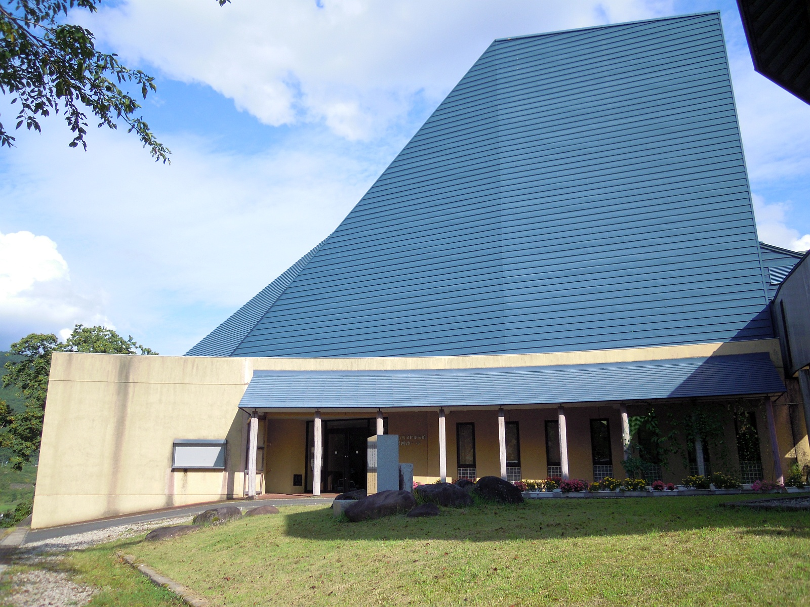 岩手県和賀郡西和賀町にある西和賀町文化創造館 銀河ホール